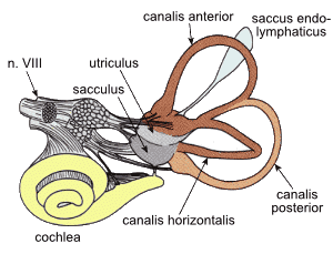 Vestibulární systém